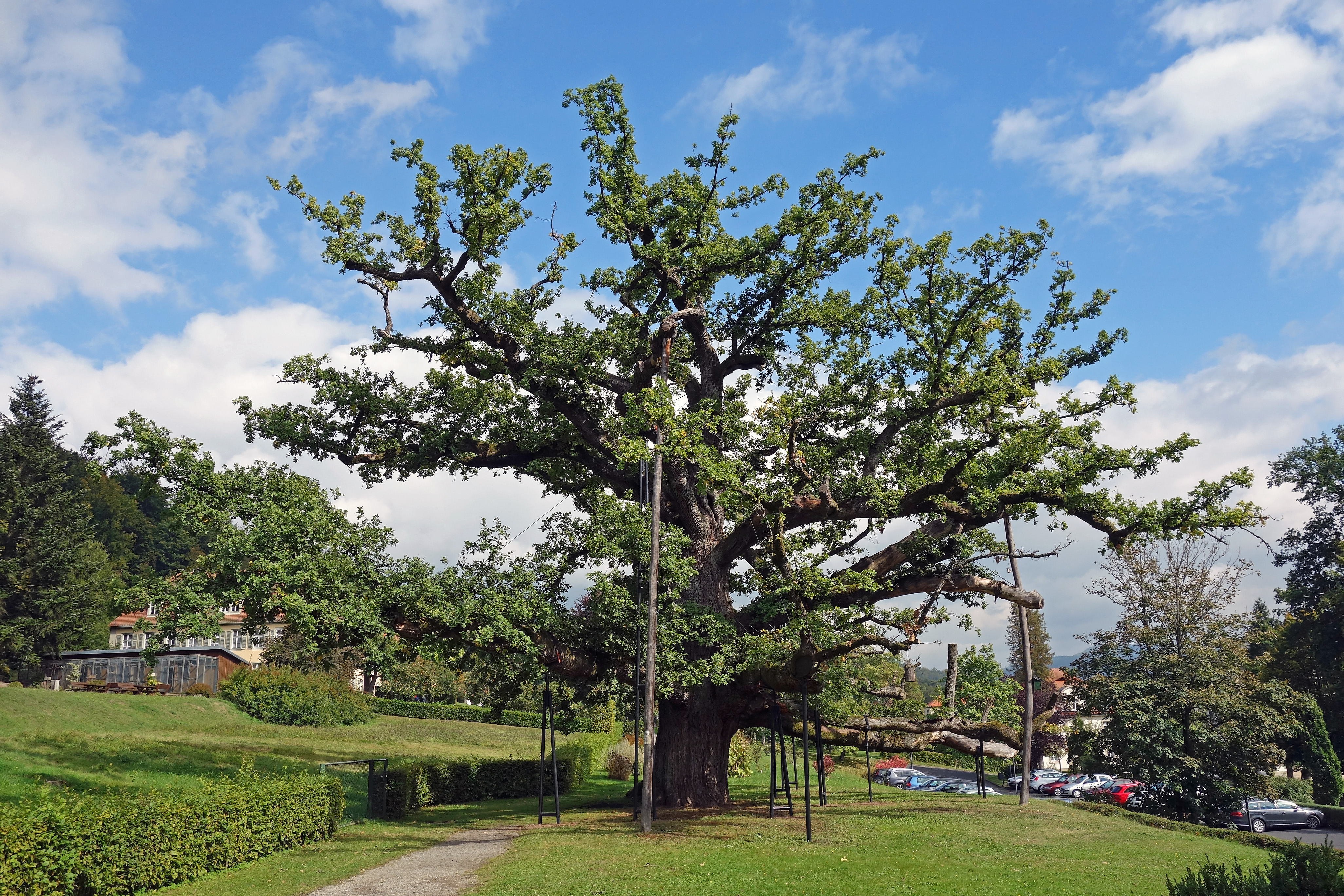 Königseiche